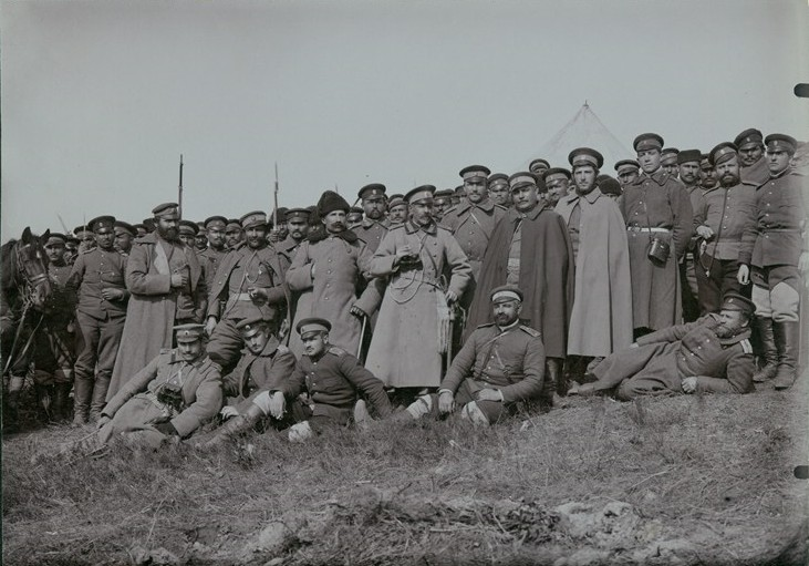 Български офицери и войници от Седемнадесети пехотен доростолски полк на Чаталджанските позиции.